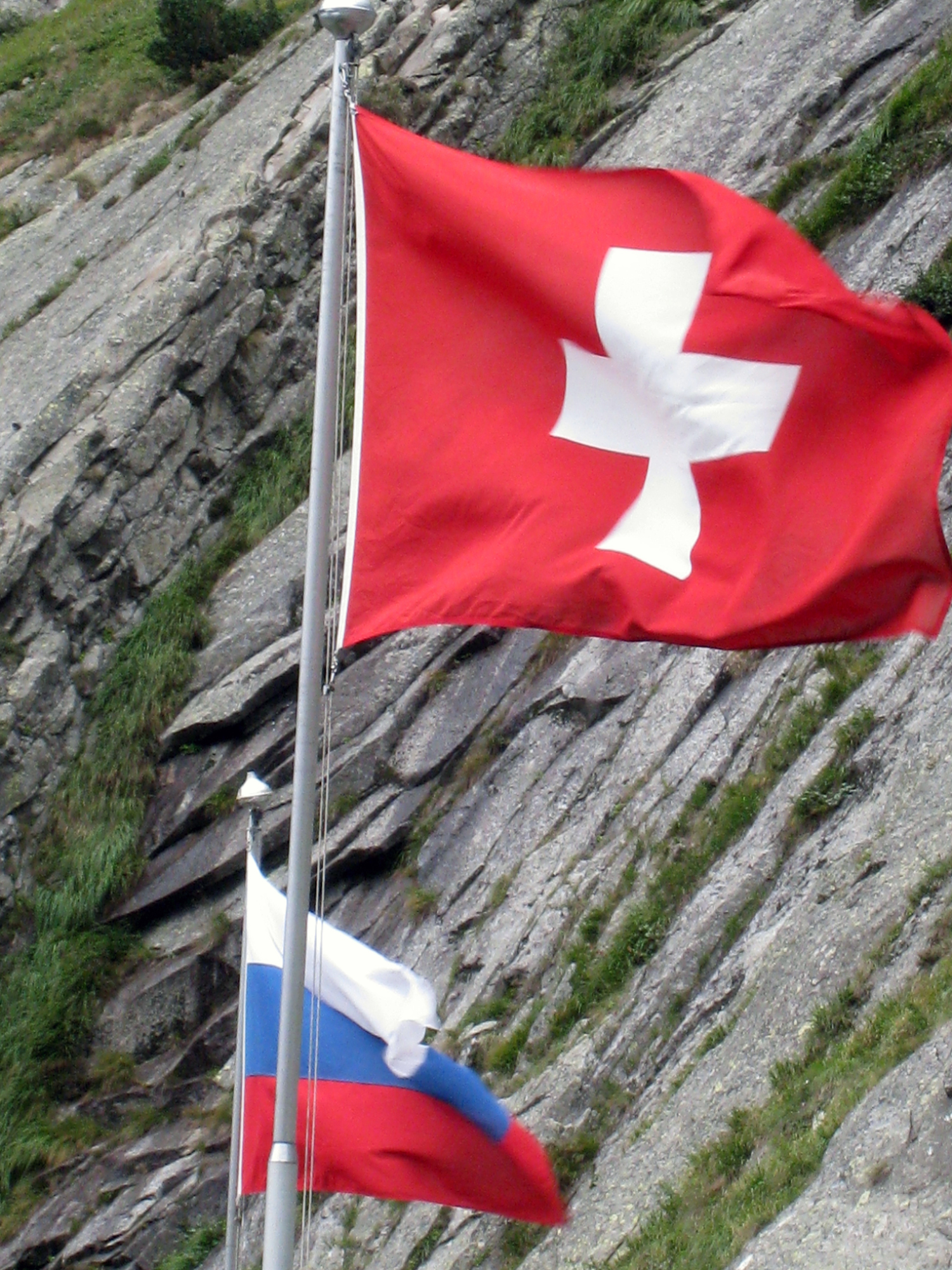 Fahnen beim Suworow-Denkmal, Schöllenenschlucht, Andermatt, Kanton Uri, Schweiz